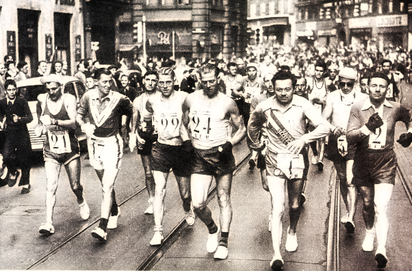 21eme EDITION STRASBOURG - PARIS 1 9 5 7 DU 7 JUIN AU 10 JUIN STRASBOURG (PLACE KLEBER)-SAVERNE - COL DE SAVERNE - SARREBOURG - CHATEAU SALINS - SAINT PRIVAS AUBOUE- CONFLANS - ETAIN - VERDUN - CLERMONT EN ARGONNE SAINTE MENEHOULD - SUIPPES - REIMS - VILLE EN TARDENOIS - VERNEUIL CHATEAU THIERRY - CHARLY - LA FERTE SOUS JOUARRE - MEAUX LAGNY SUR MARNE - NOGENT SUR MARNE- PARIS - 12eme PISTE MUNICIPALE DU BOIS DE VINCENNES“ LA CIPALE “ 522 KM CLASSEMENT 1-ROGER-GILBERT. MONTREUIL. FRA. 522KM. 69H38’. 7.496 2-GUNY-EDMOND. AULNOYE. FRA. 522KM. 70H23’. 7.416 3-GODART-LOUIS. FILS SAINT DENIS. FRA. 522KM. 70H46’. 7.376 4-LEGRAS-GEORGES. ESTERNAY. FRA. 522KM. 70H54’. 7.362 5-GIRE-ALBERT. BASSE YUTZ. FRA. 516KM. 74H20’. 6.941 6-GUNY-CHARLES. AULNOYE. FRA. 516KM. 75H45’. 6.811 7-MAYEUR-ROBERT. CHATEAU THIERRY. FRA. 516KM. 76H18’. 6.530 8-POUPART-LOUIS. BEAUVAIS. FRA. 516KM. 79H01’. 6.526 9-RIVIERE-ANDRE. ARMENTIERES. FRA. 490KM. 74H50’. 6.547 10-SEIBERT-ALBERT. MOREZ. FRA. 483KM. 70H50’. 6.818 11-MAINEMARE-HENRI. PC-NORMANDIE. FRA. 471KM. 73H54’. . 12-PETIT-ADRIEN. CM-ELBEUF. FRA. 471KM. 74H04’. . 13-VINCENT-MARCEL. AM-NANCY. FRA. 467KM. 76H30’. . 14-KRUNEMACHER-JACOB. PAYENNE. SUI. 400KM. 65H00’. . 15-BARROIS-GEORGES. TROYES-ST/MAURE. FRA. 377KM. 62H00’. . 16-GAUTHIER-LUCIEN. ENTENTE-GISORES. FRA. 353KM. 55H00’. . 17-OBSTETAR-FRANCOIS. AM-NANCY. FRA. 331KM. 52H00’. . 18-BRANDT-JACQUES. UM-STRASBOURG. FRA. 320KM. 48H00’. . 19-CASTELIN-GUY. SC-NEUILLY S/M. FRA. 315KM. 50H00’. . 20-BEDEE-CLAUDE. AM-LAGNY S/M. FRA. 265KM. 41H00’. . 21-CAMARA-RENE. US-METROT. FRA. 240KM. 38H00’. . 22-PLIQUE-JEAN. CM-COMMERCY. FRA. 184KM. 26H00’. . 23-LORIAUX-EUGENE. CM-ST/QUENTIN. FRA. 182KM. 25H00’. . 24-LAROCHE-ANDRE. SOCHAUX. FRA. 163KM. 23H00’. . 25-THOMAS-JEAN. SC-NEUILLY S/M. FRA. 134KM. . 26-LEZIN-ARMAND. AS-RODIA-LYON. FRA. 126KM. . 27-ZAKZEK-JEAN. AM-NANCY. FRA. 117KM. . 28-SIMON-JOSY. AA-LUXEMBOURG. LUX. 91KM. . 29-DELEVOUE-ROBERT. AS-ROUBAIX. FRA. 38KM.